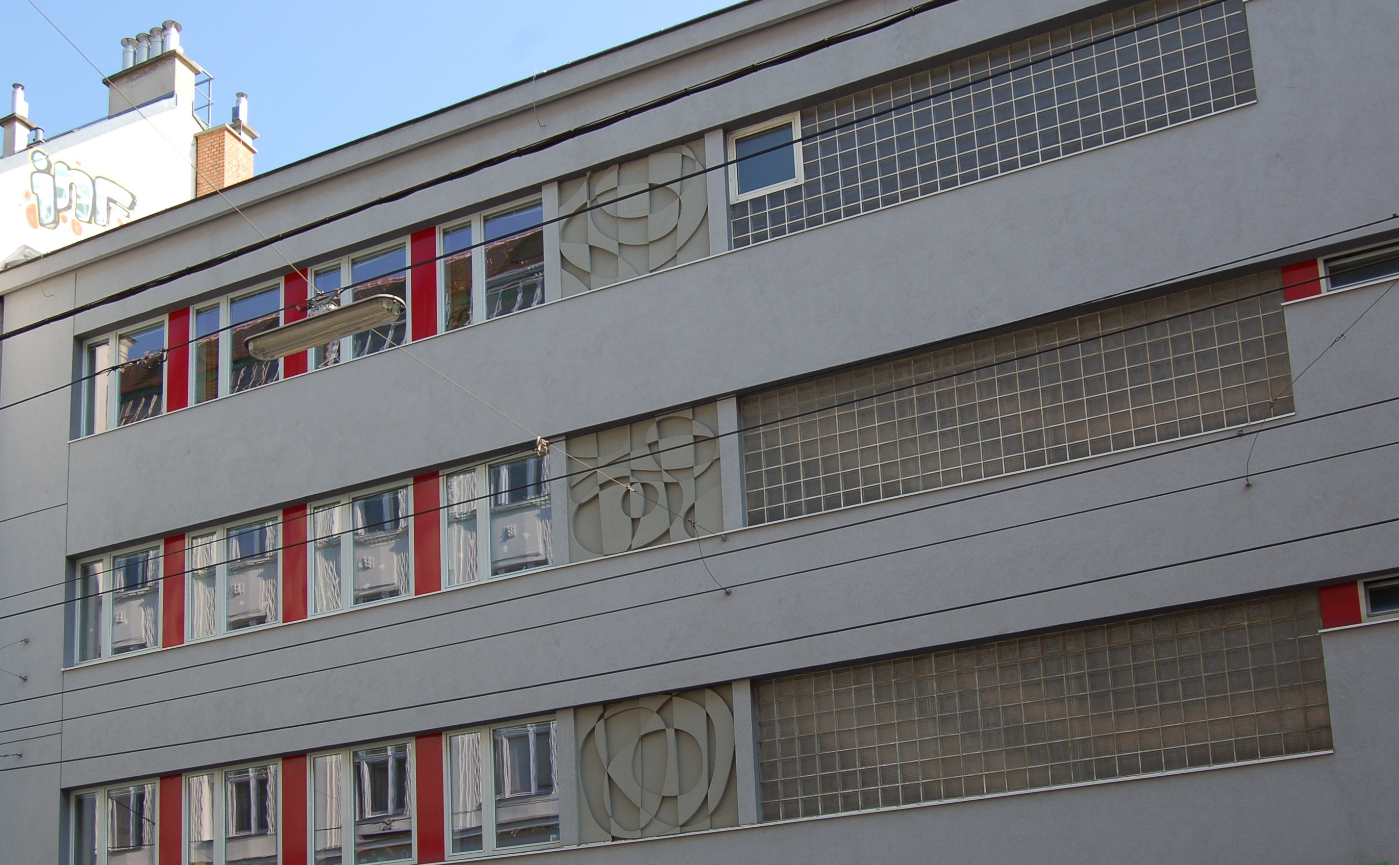 Das denkmalgeschützte Betonrelief in der Josefstädter Straße 93-97 in Wien-Josefstadt. Das Wohnhaus wurde 1963 durch die Architekten Richard Gach und Ernst Schuster erbaut.